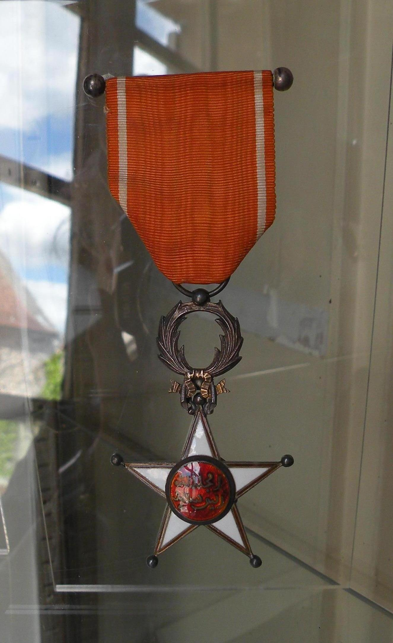 médaille Ordre Ouissam Alaouite, Maroc exposé au musée des Sphais à Senlis